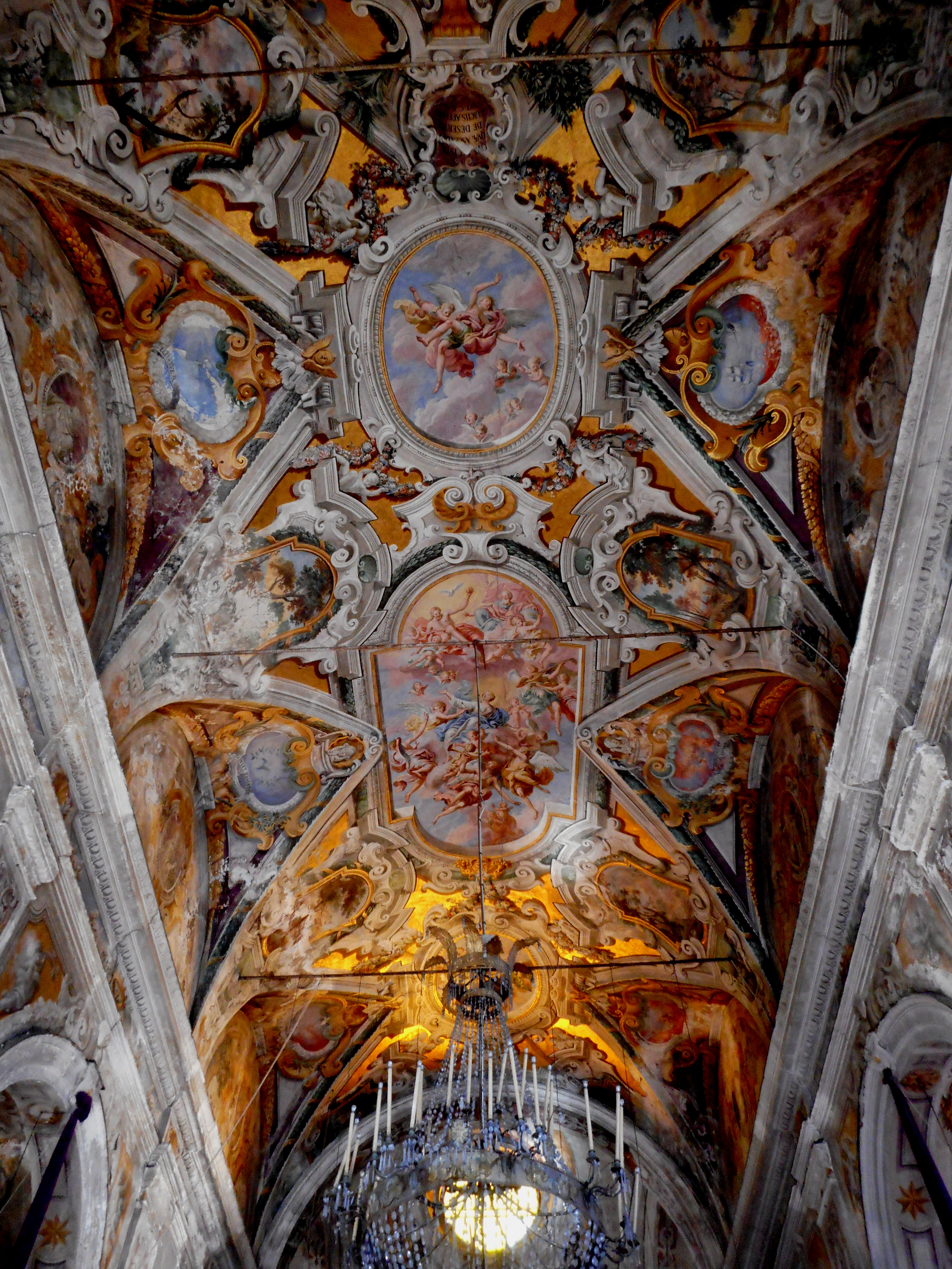 Soffitto della chiesa dei Santi Quaranta Martiri Pisani